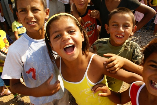 Montenegrin Roma children.